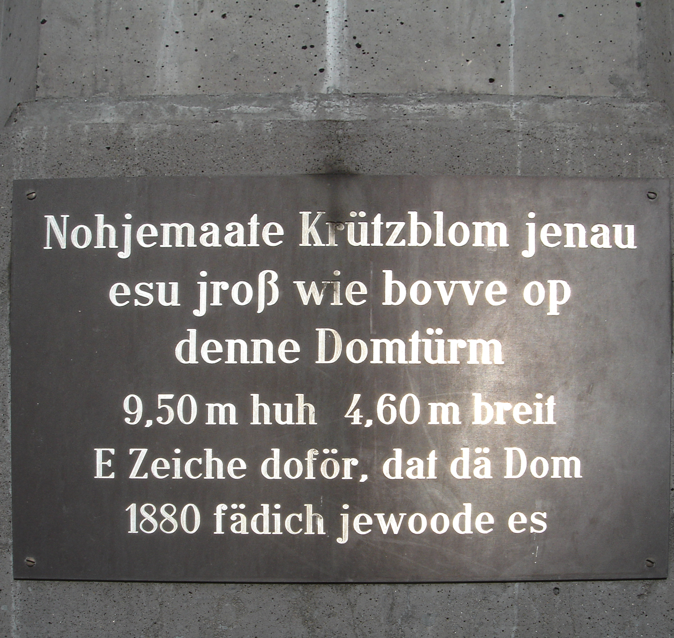 Kölsche Inschrift auf einer Nachbildung der Kreuzblume vor dem Kölner Dom.